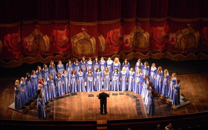 Coral Femenino de San Justo en el Teatro Colón de Buenos Aires, Ciclo de Intérpretes Argentinos - Domingos de Cámara. 25/09/2011